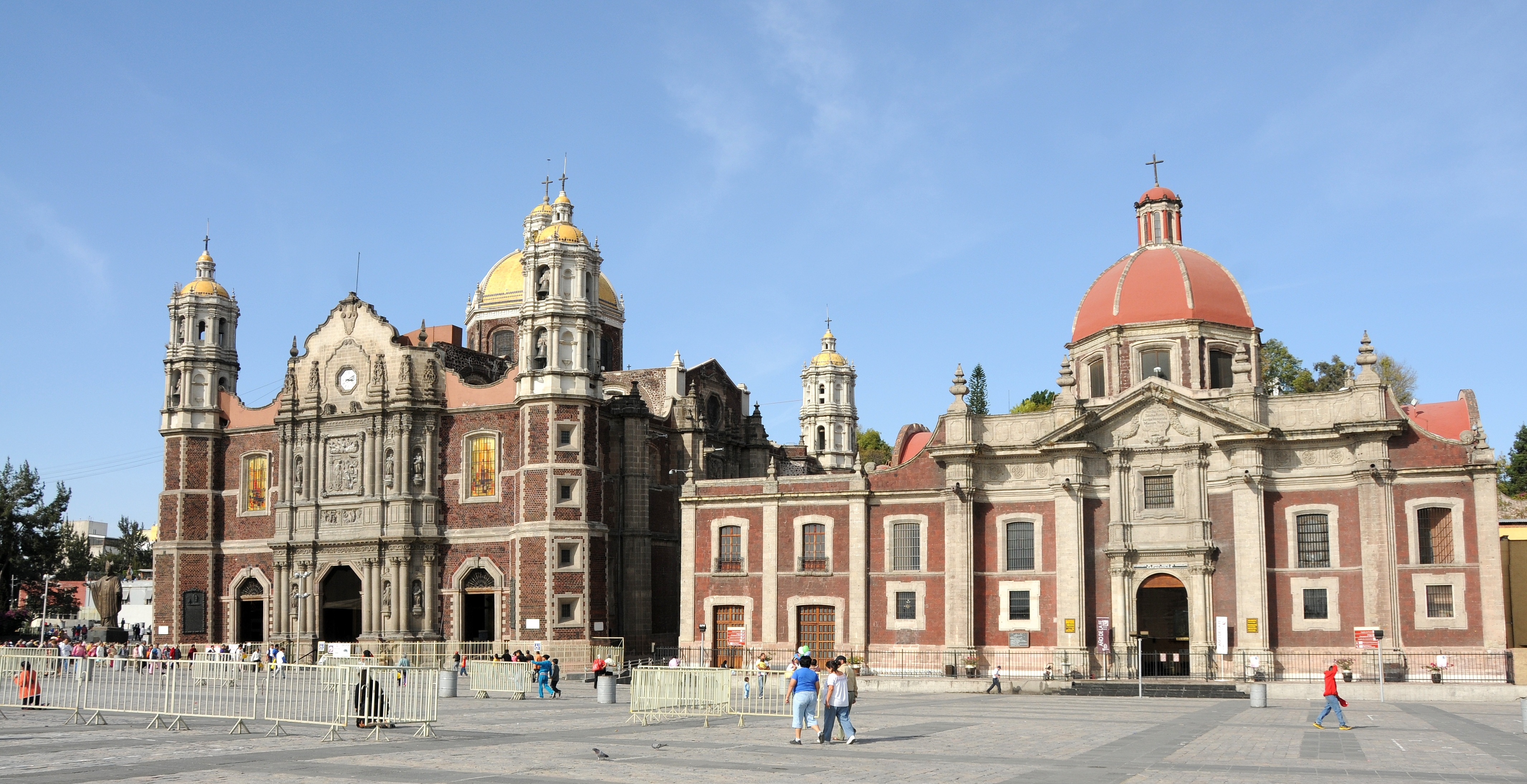 Pohlad na starú baziliku v Guadalupe